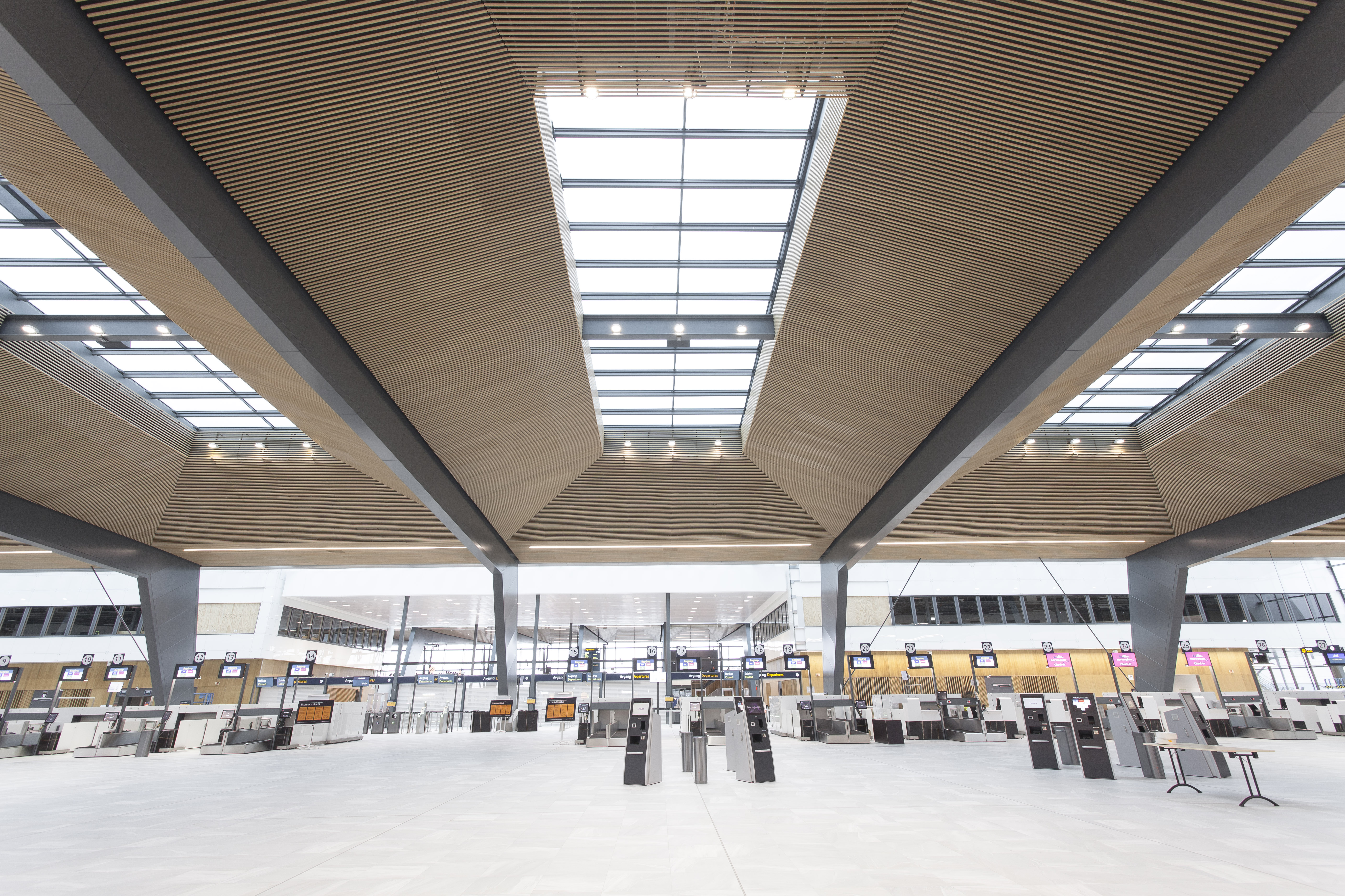 Bergen Airport Flesland 2017 - Check in area